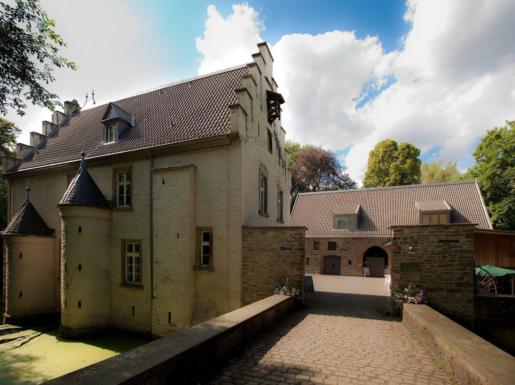 Wasserschloss Werdringen 2009/06/10